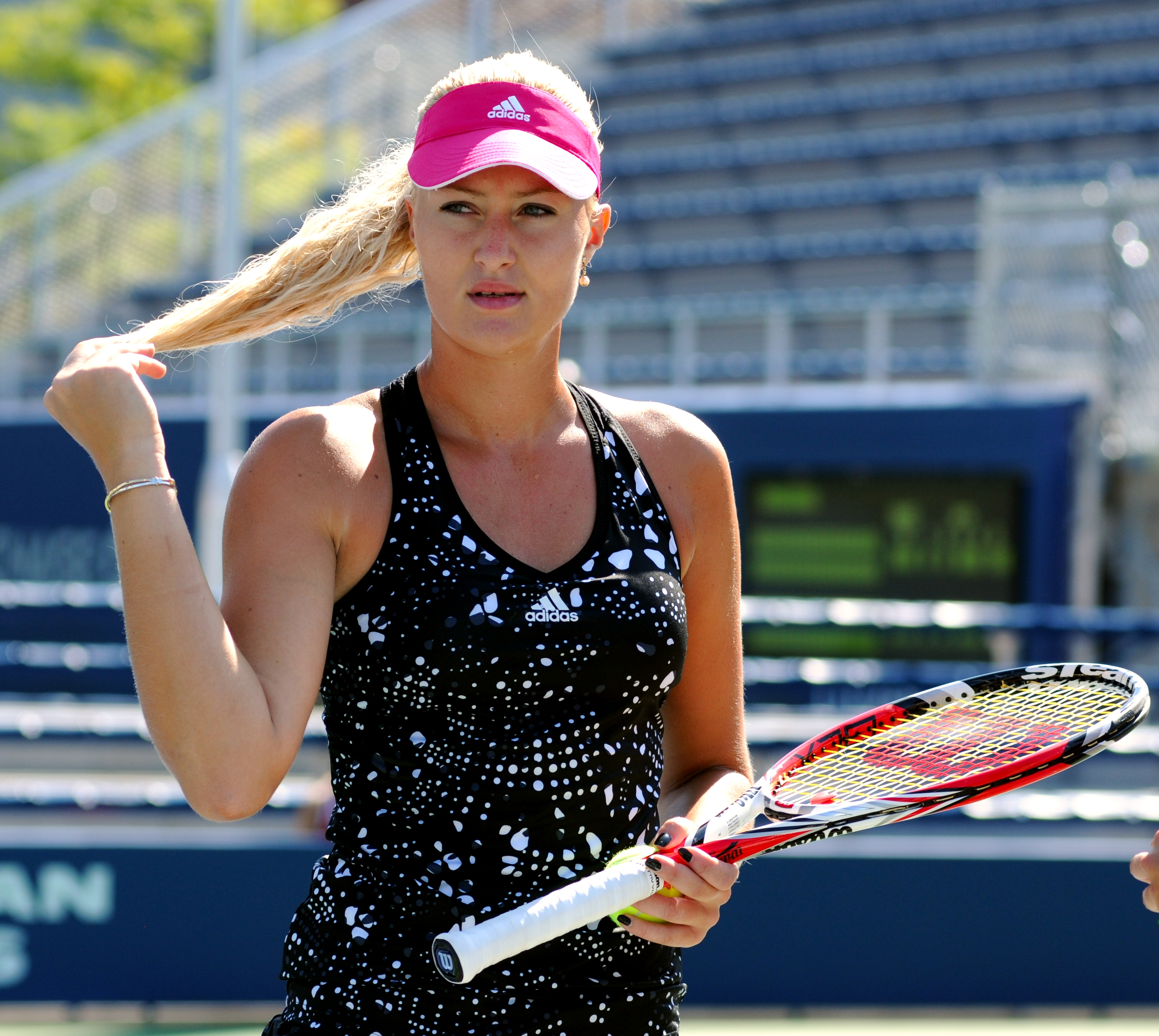 US Open 2014